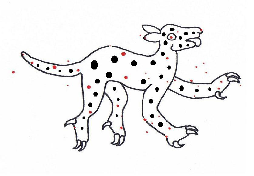 Constelación de la Jaguar según el estilo mexica de escritura, que se sobrepone a la constelación de Ursa Major. Se complementa con la imagen:Citlalocelotl. Los puntos rojos representan las estrellas reales.